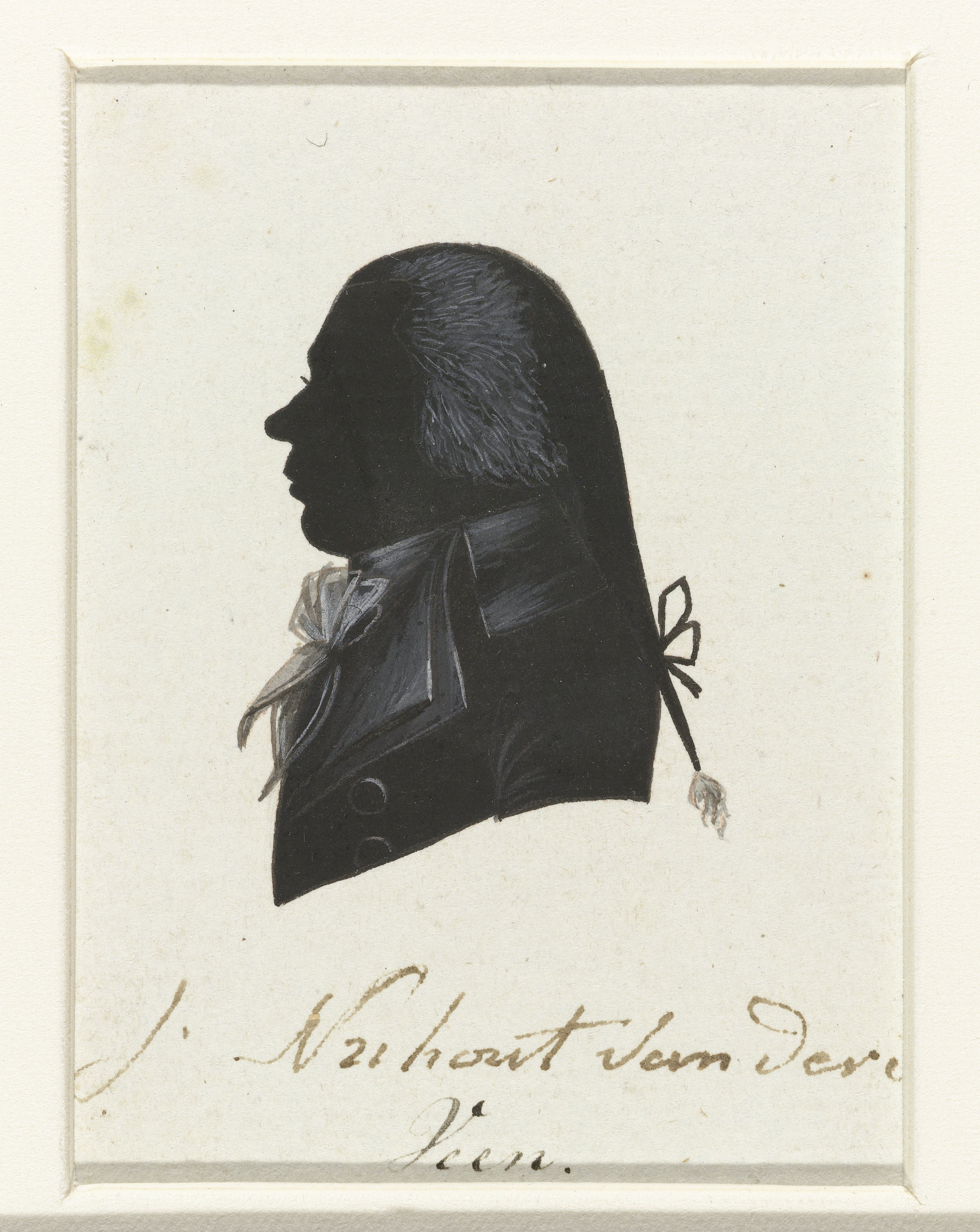 J. Nuhout van der Veen. Tekening in Oost-Indische inkt, waarschijnlijk gemaakt door Hausdorff. De tekening behoort tot een serie van portretten van afgevaardigden naar de Eerste Nationale Vergadering in 1796-1797. Van de serie werden gravures gemaakt die zijn afgedrukt in "Geschiedenis der staatsregeling, voor het Bataafsche volk", een boek van Cornelius Rogge (1799).